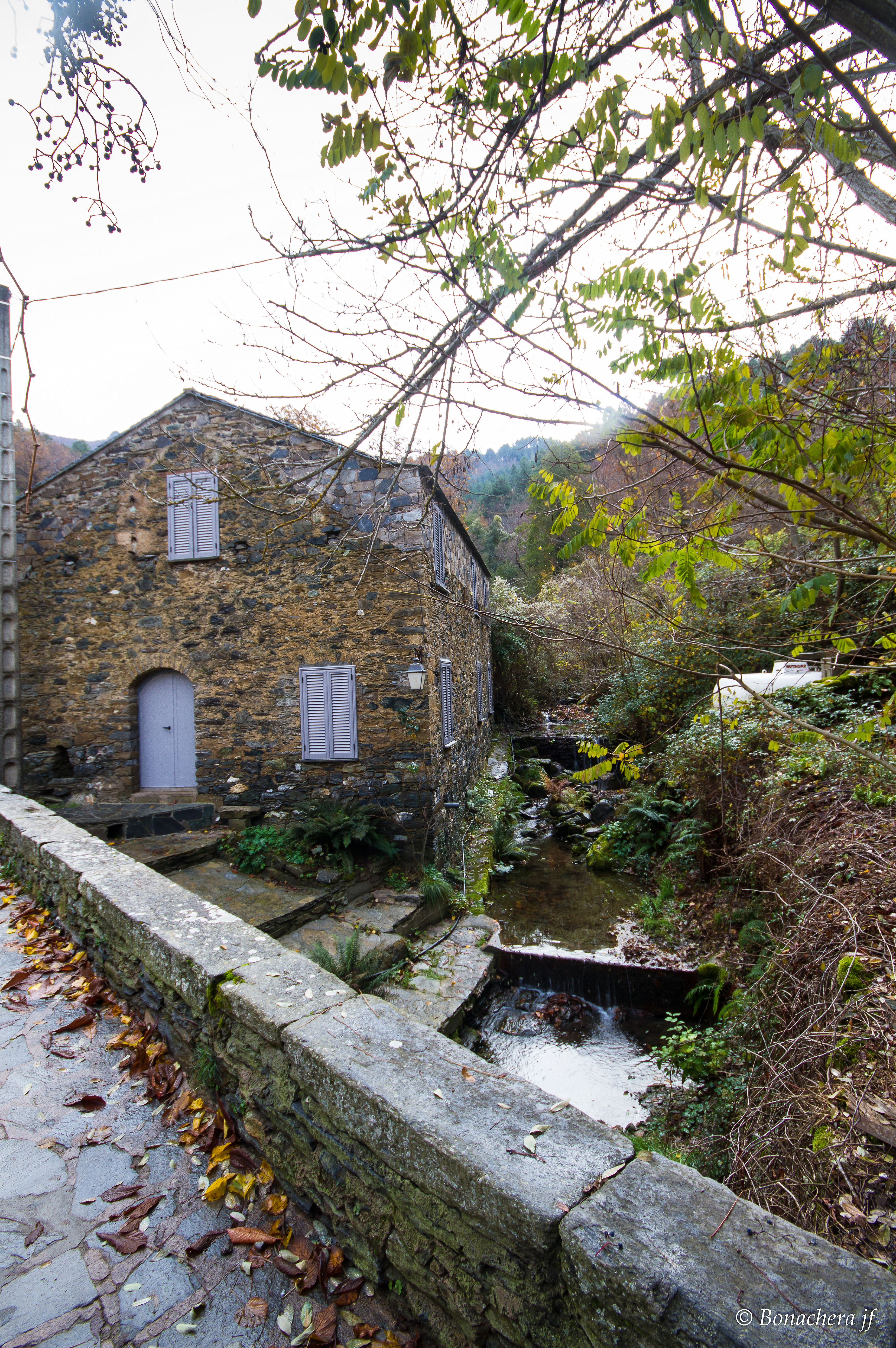 Saliceto, Castagniccia (Corse) - Entrée du village